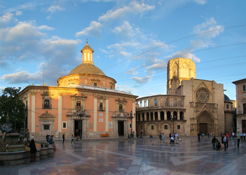 Plaça de la Mare de Déu, València, País Valencià, Espanya.